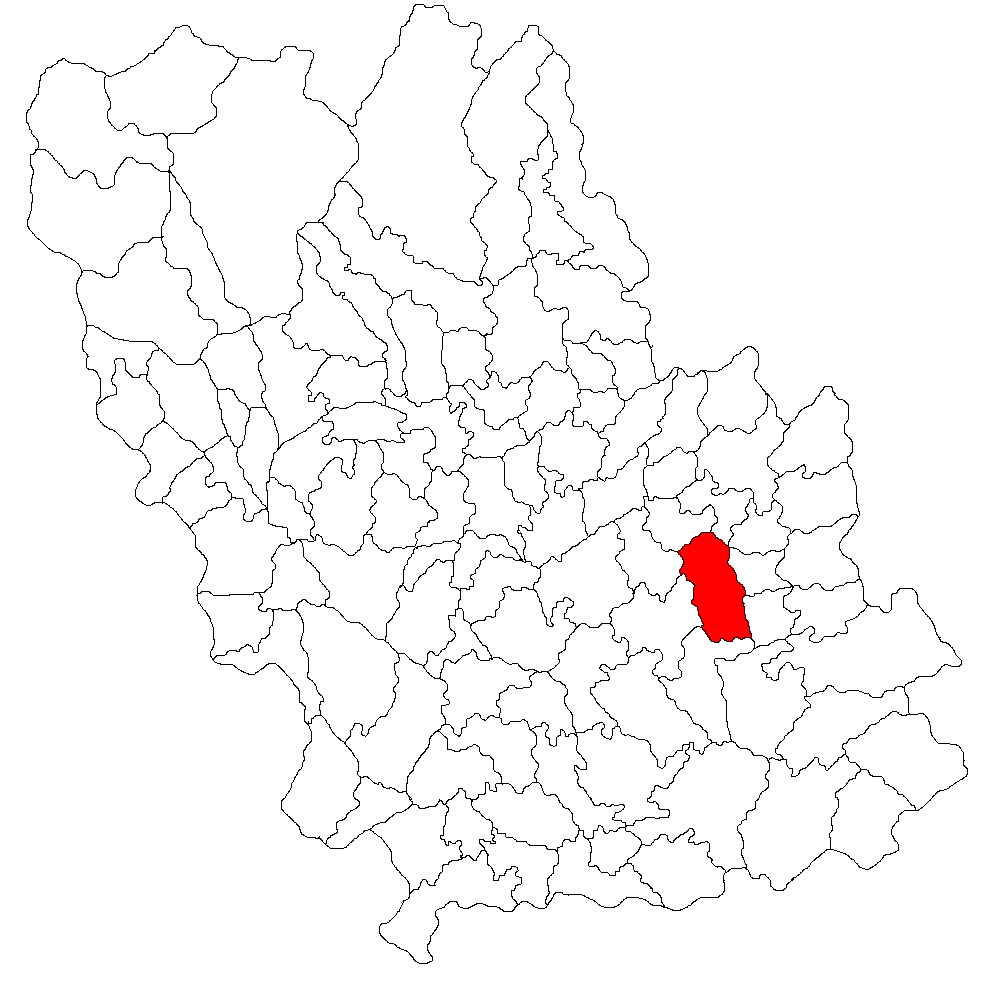 Categorie:Hărţi ale judeţului Prahova